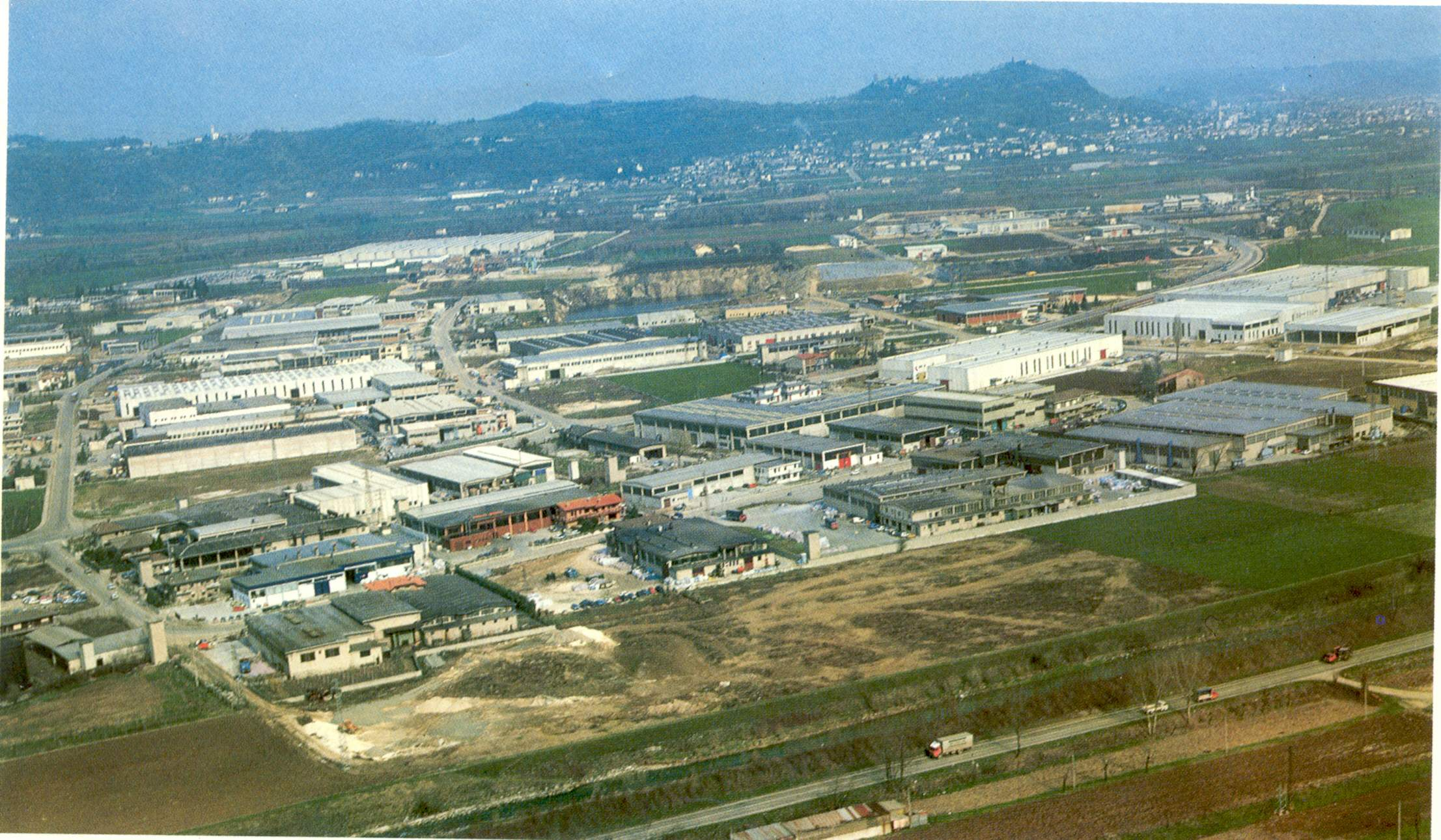 Arzignano (VI), zona industriale